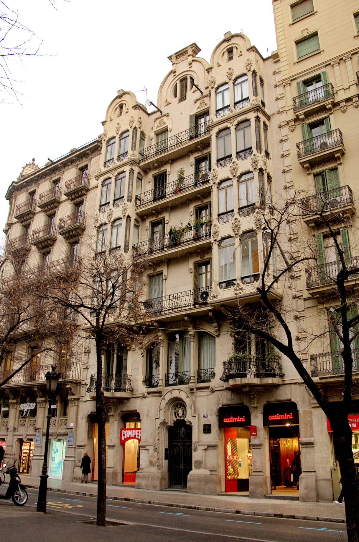 Casa Antoni Costa (Barcelona)